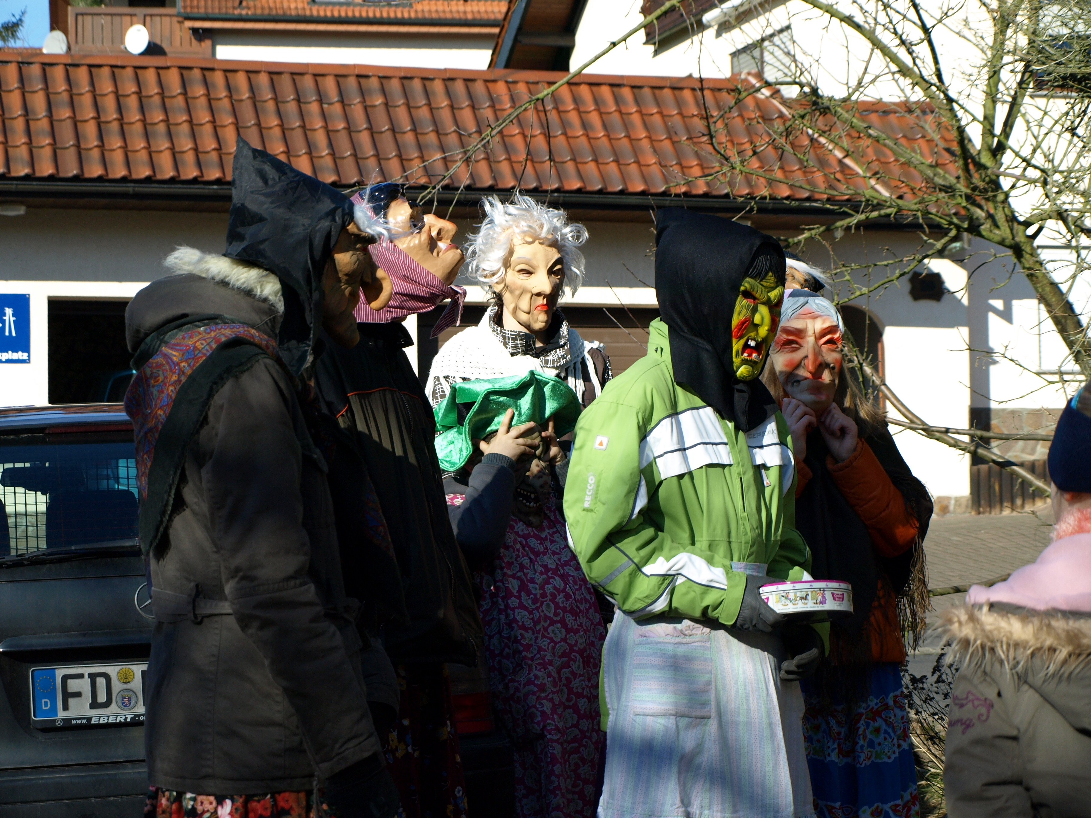 Hutzelhexen in Silges im Jahr 2008